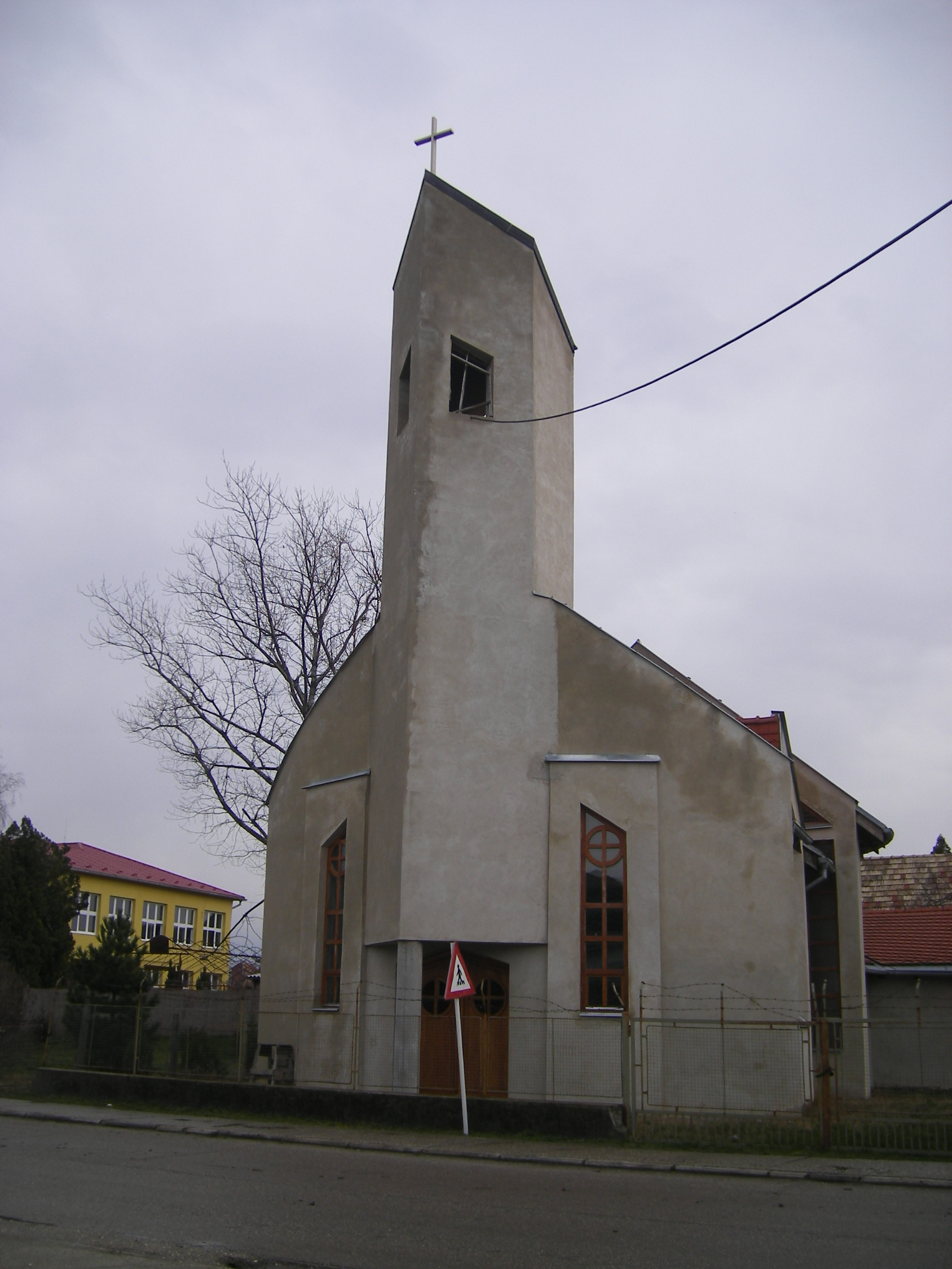 Izsa - evangélikus templom